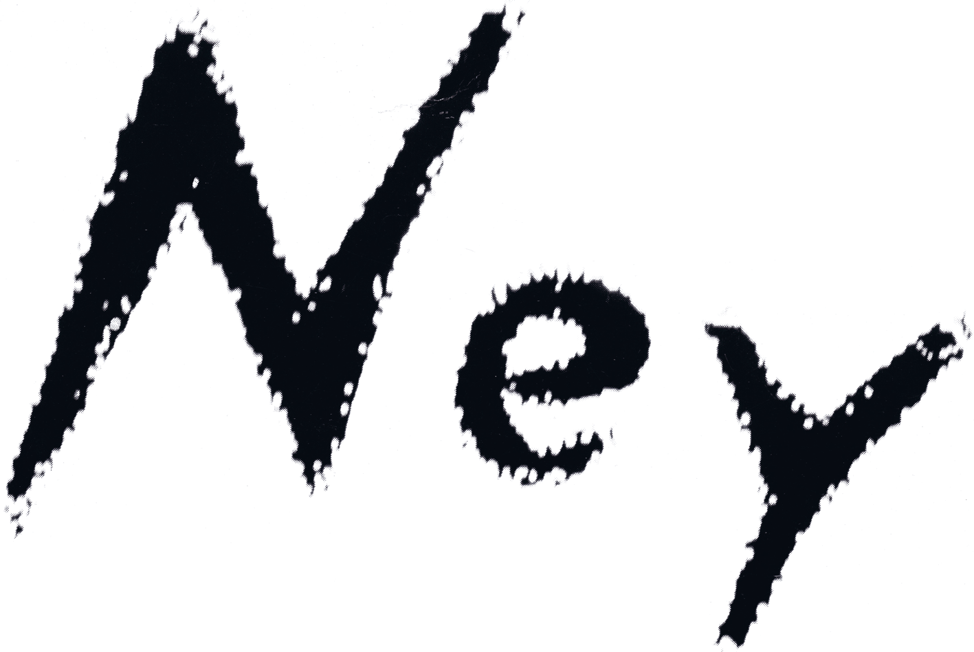 Ney's Signatur